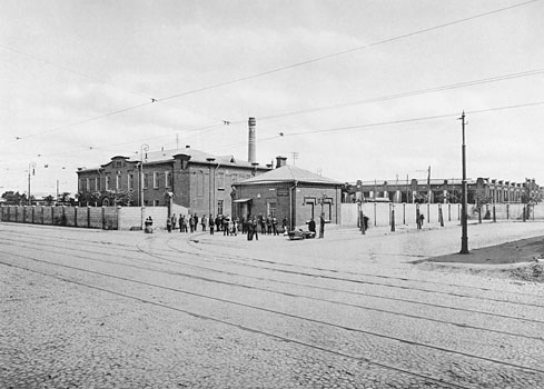 161. Золоторожскiй паркъ городскихъ желЪзныхъ дорогъ. (Москва - ТРЗ - угол Волочаевской и Таможенного.